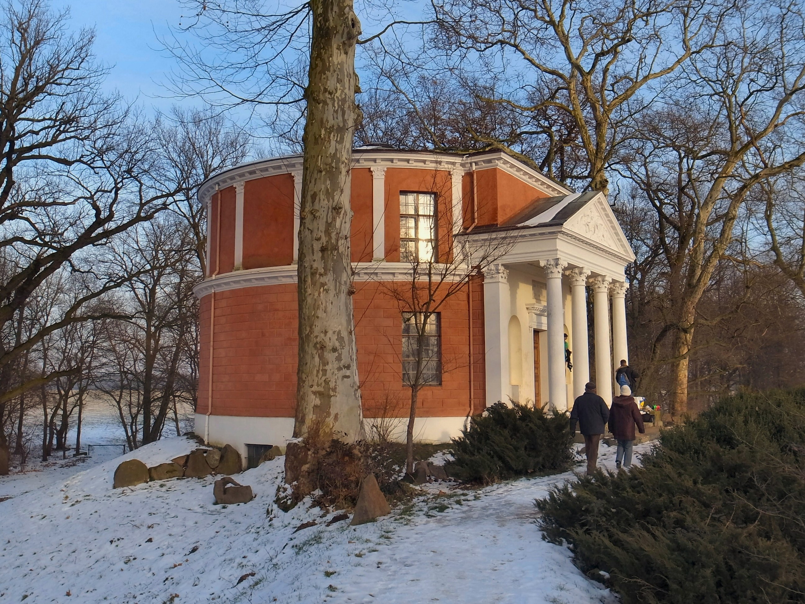 Wörlitzer Park, Pantheon